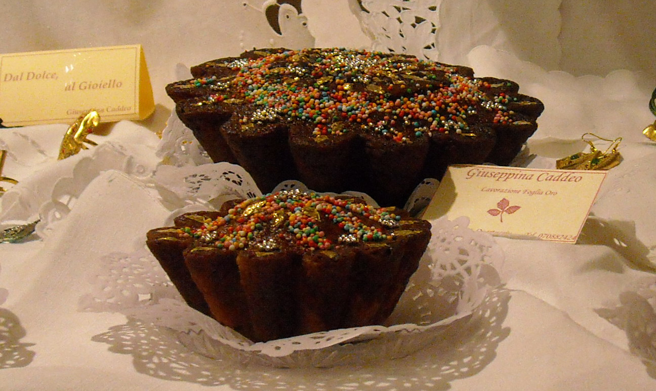 Mostra di pani e dolci tradizionali della Sardegna - Casa Angioni, Quartucciu (Cagliari).